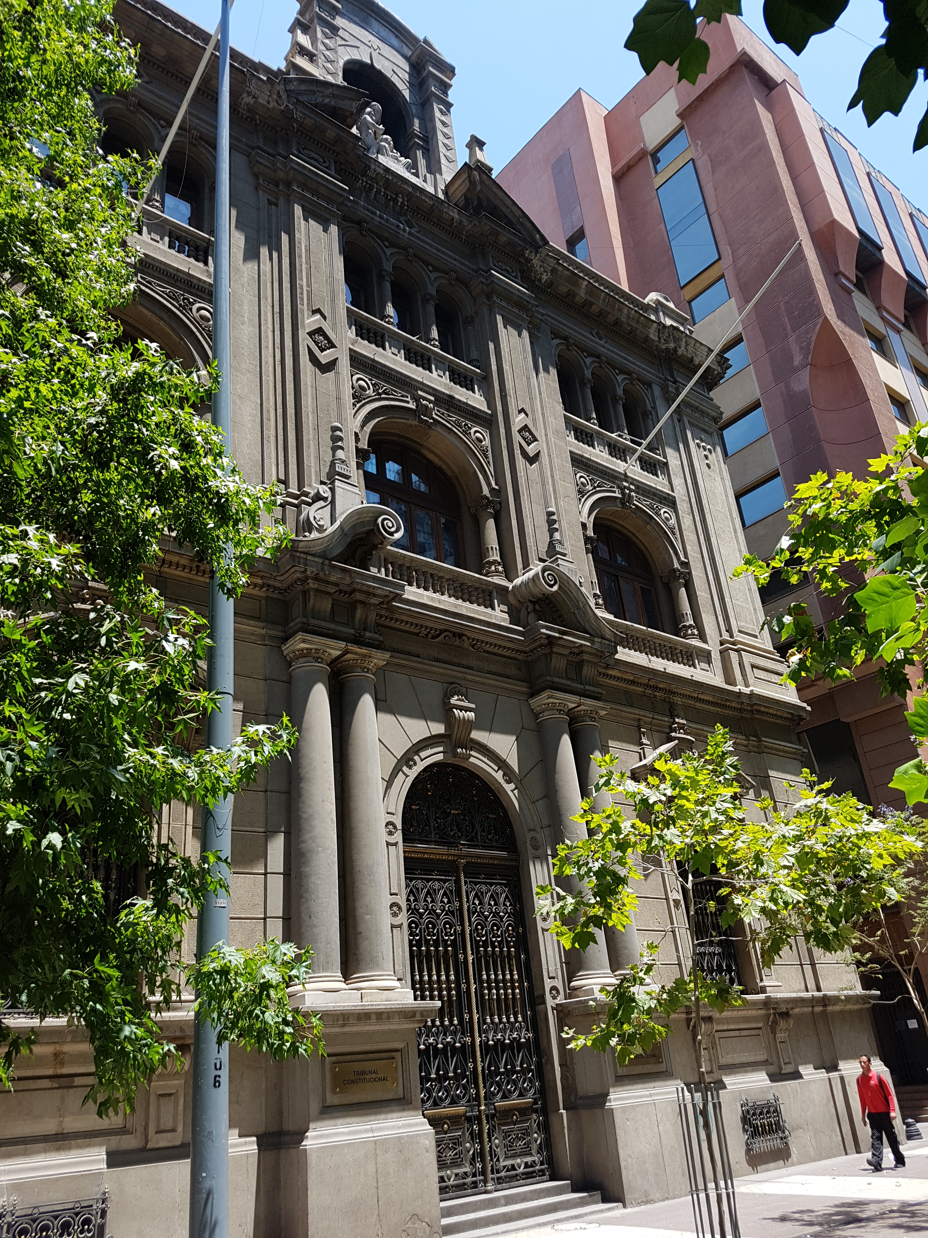 Sede del tribunal constitucional de Chile